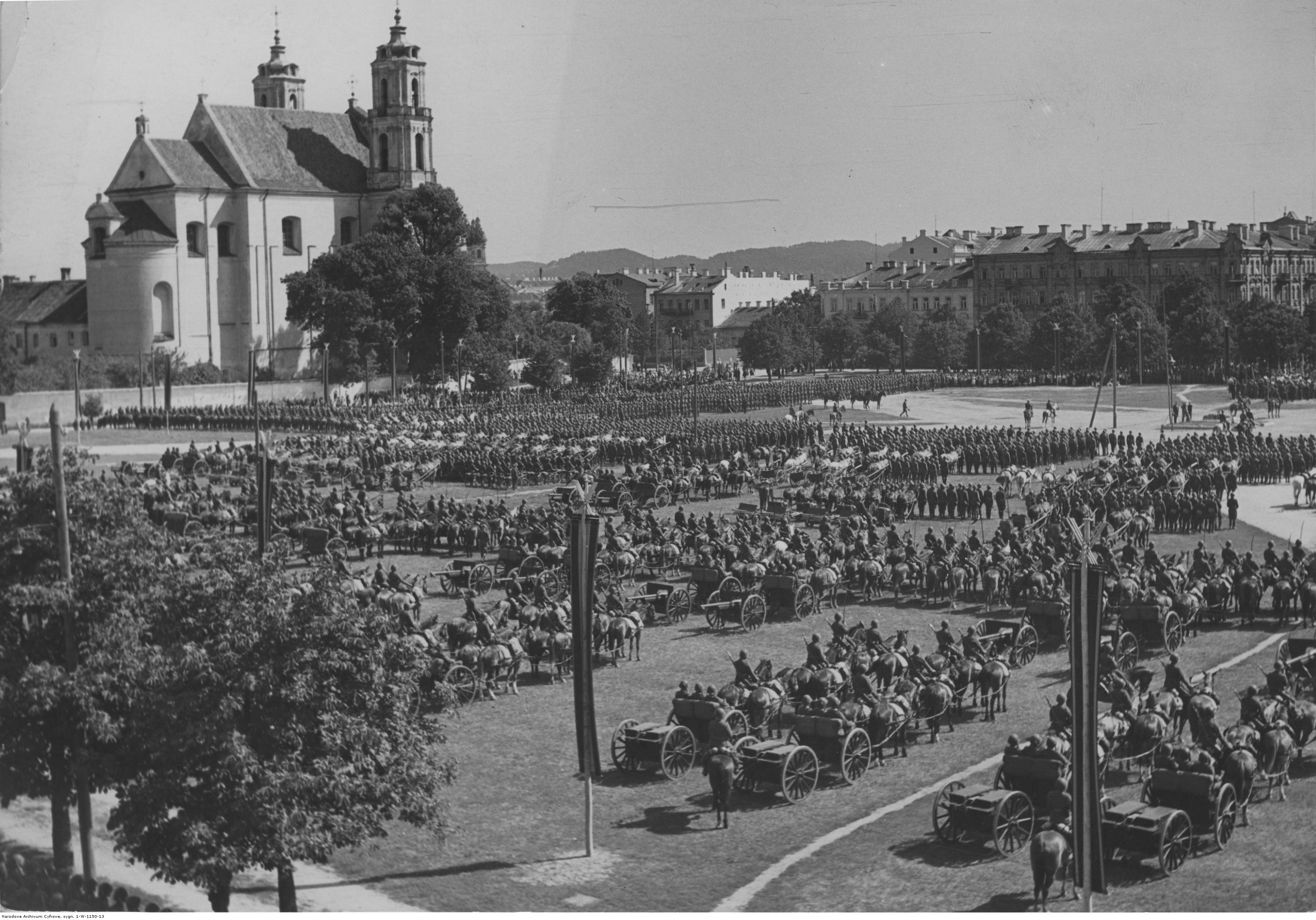 Jubileusz dwudziestopięciolecia 1. Dywizji Piechoty Legionów w Wilnie. Fragment uroczystości na placu Łukiskim; sierpień 1939. W oddali widoczny kościół św. Jakuba i Filipa. Koncern Ilustrowany Kurier Codzienny - Archiwum Ilustracji. Sygnatura: 1-W-1150-13